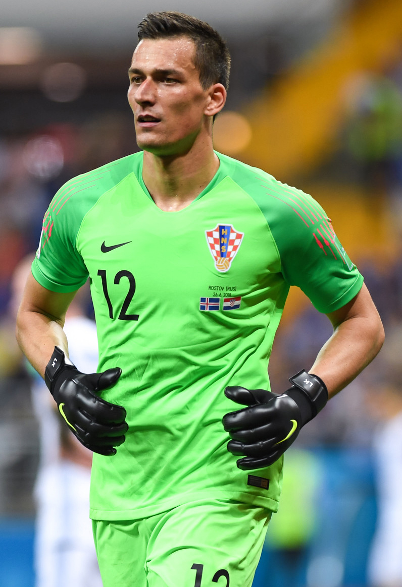 Сборная Исландии уступает Хорватии и покидает ЧМ-2018